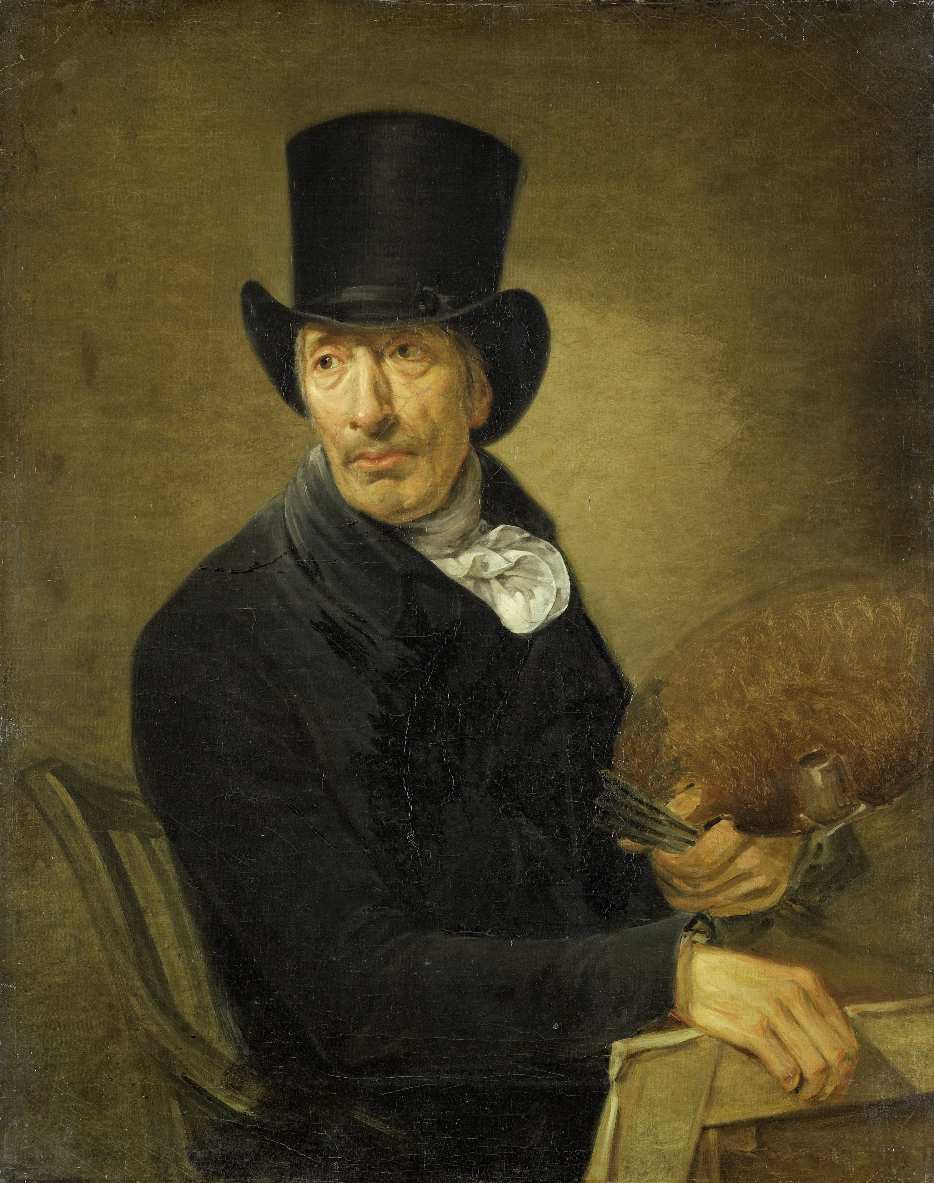 Portret van de kunstschilder Pieter Barbiers (1749-1842), door Jean Augustin Daiwaille